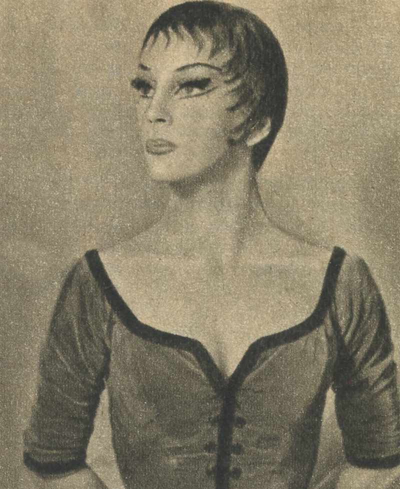 La bailarina Olga Ferri en 1963 para Primera Plana.